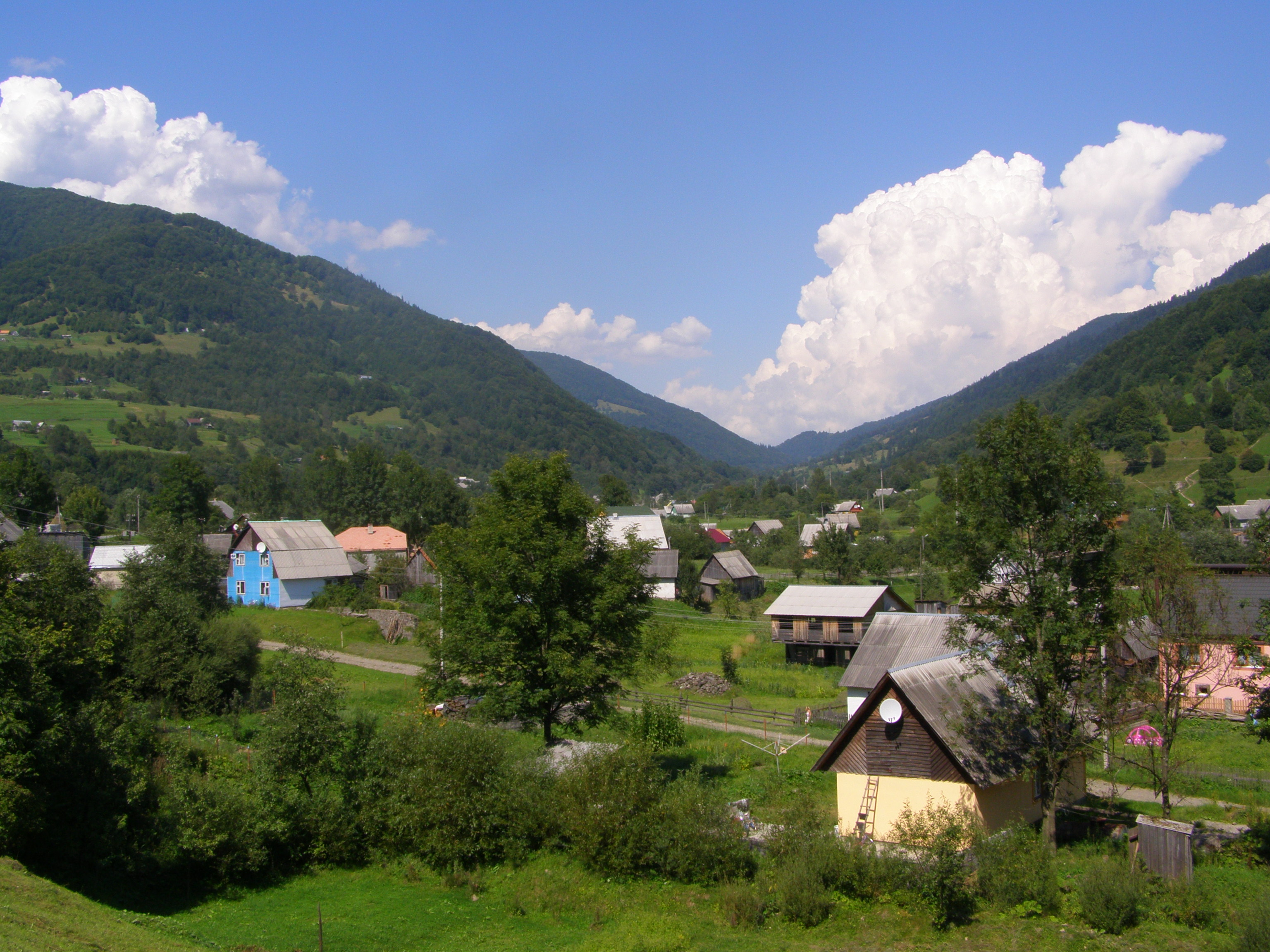 Kvasy